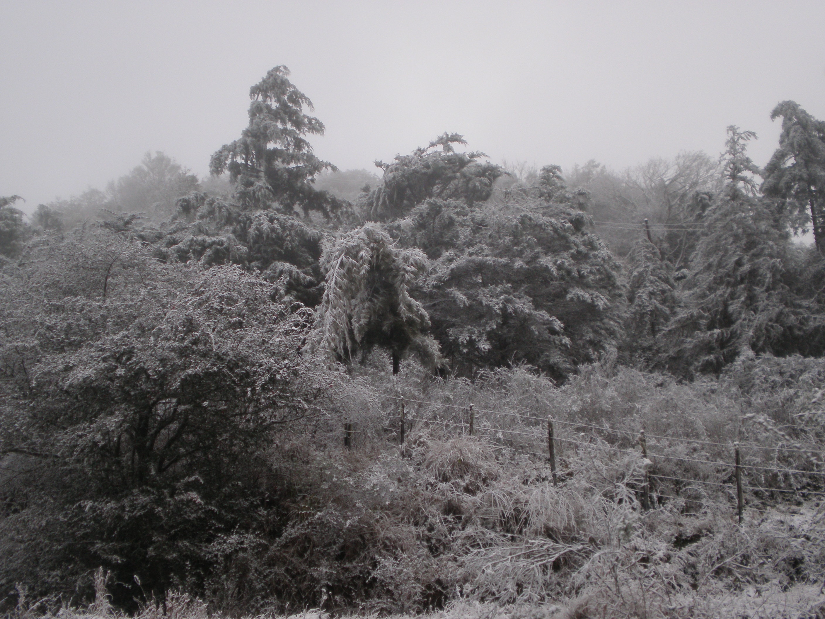 Cerro San Javier, Argentina.